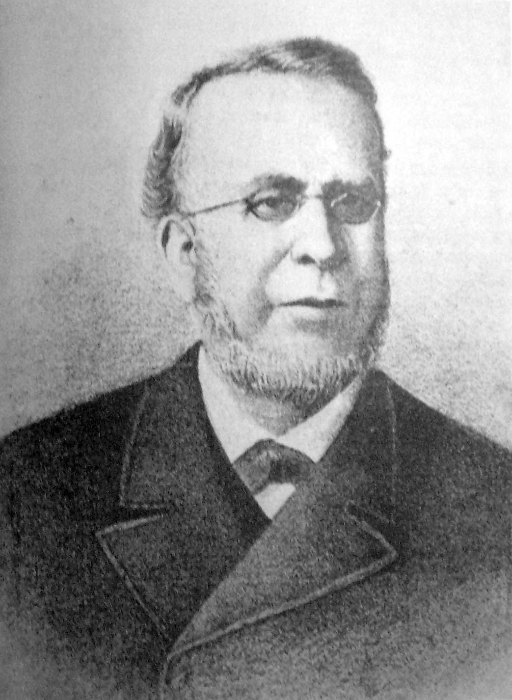 Guillermo Rawson